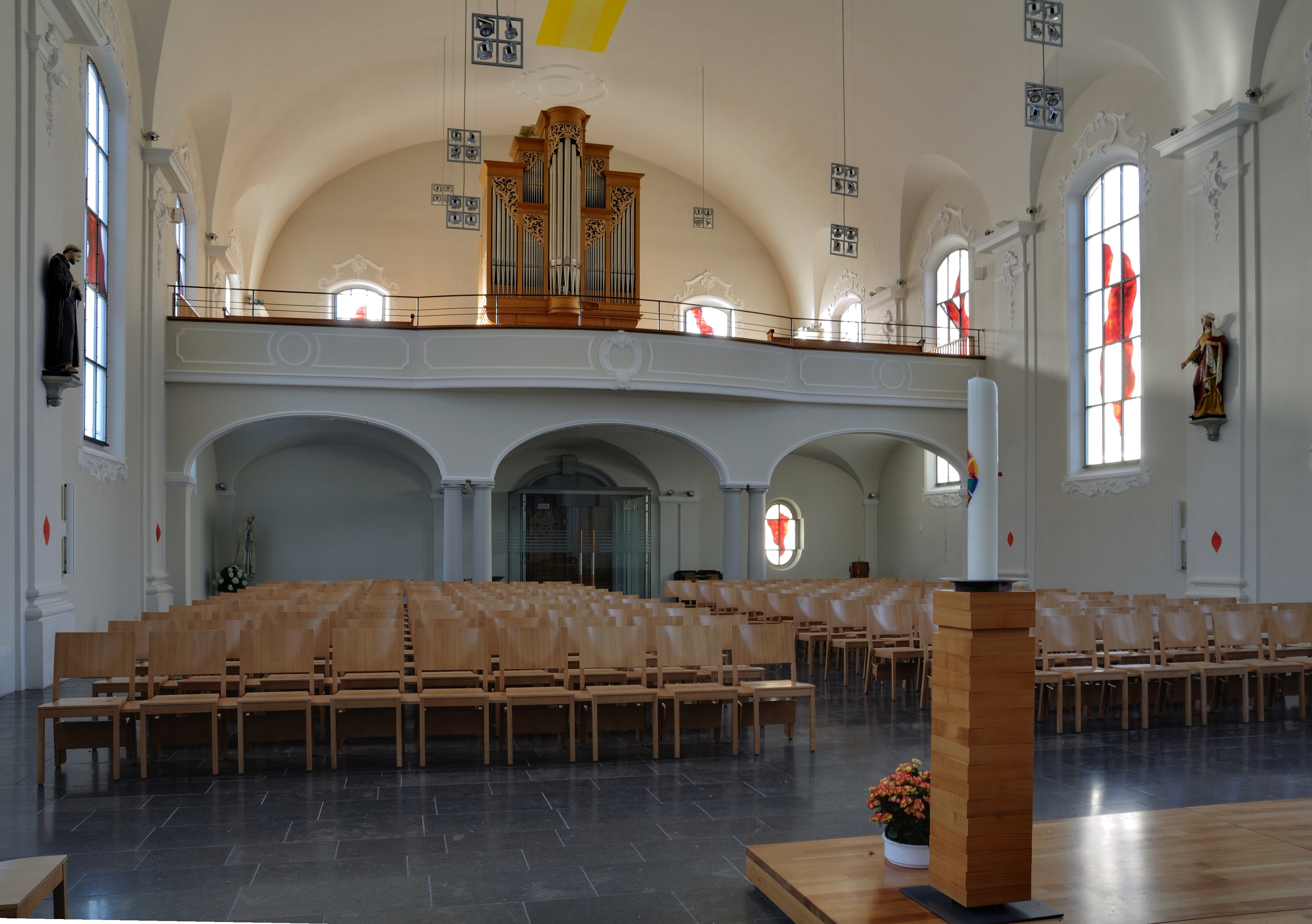 Rheinfelden-Herten: St. Josef, Langhaus zur Orgelseite